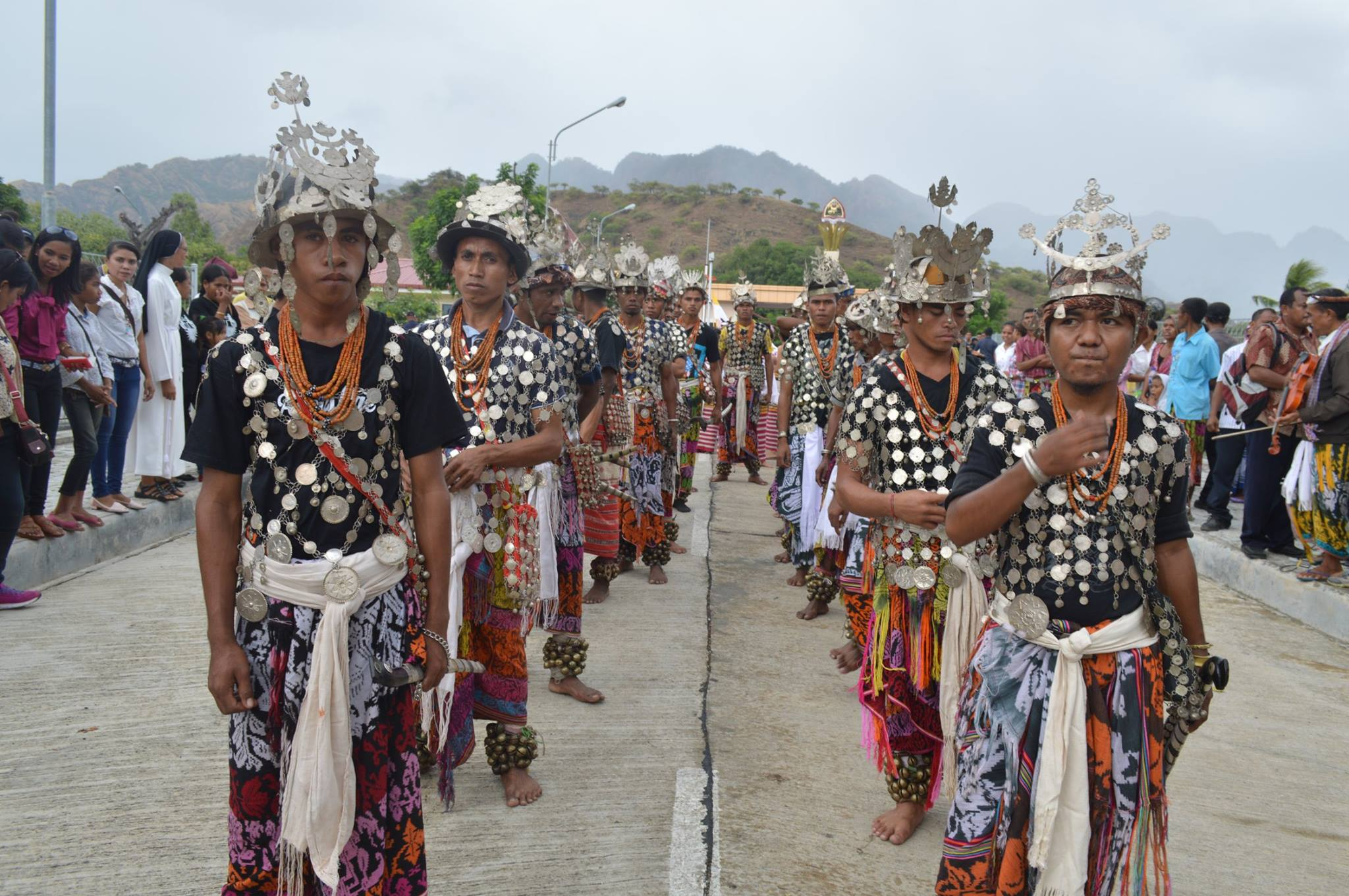 Traditionelle Festtagskleidung in Oecusse